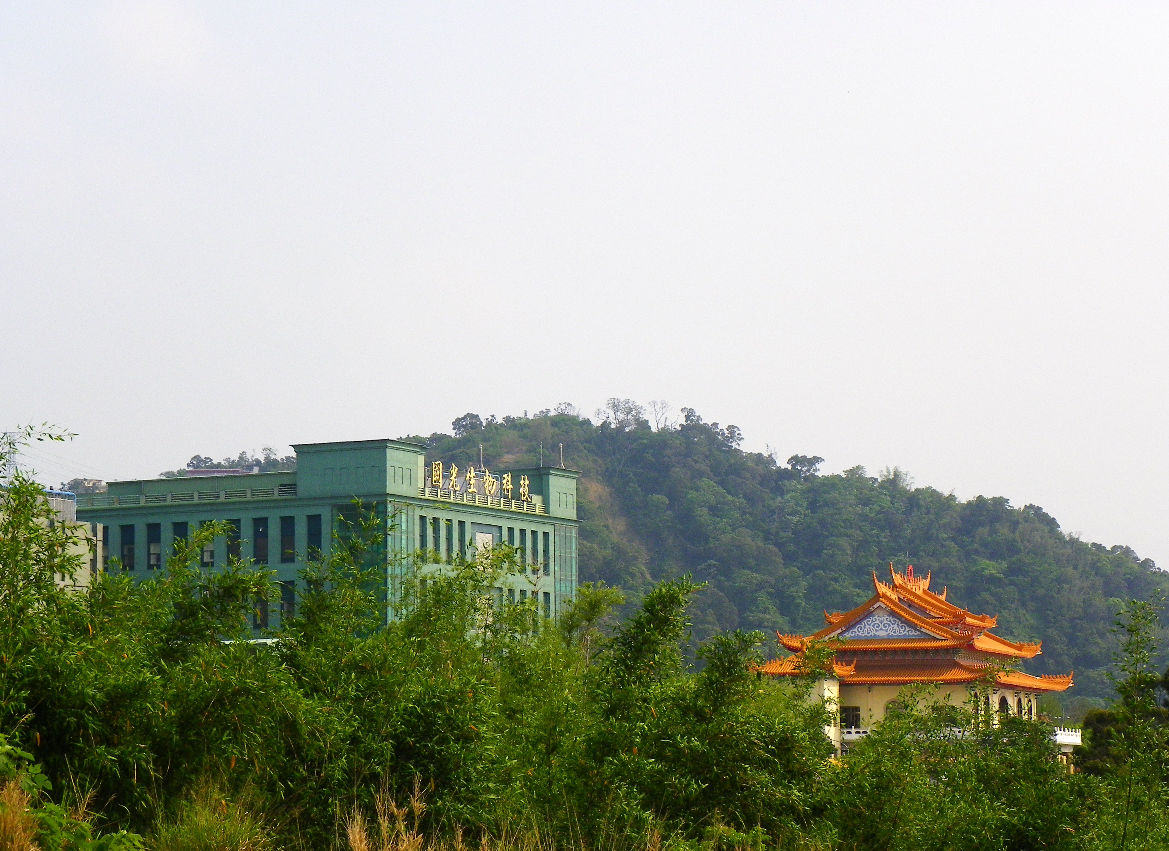 臺中縣潭子鄉聚興村（今臺中市潭子區聚興里）的國光生物科技（左）與道觀中樞院（右）。Bân-lâm-gú: Tâi-tiong-kuān Tâm-tsú-hiong Tsū-hing-tshuan (kim Tâi-tiong-tshī Tâm-tsú-khu Tsū-hing-lí) ê Kok-kong Senn-bu̍t Kho-ki(tsó) í tō-kuànn Tiong-su-īnn(iū).